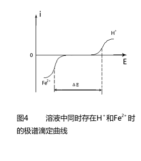 中文（中国大陆）: 安培滴定法图